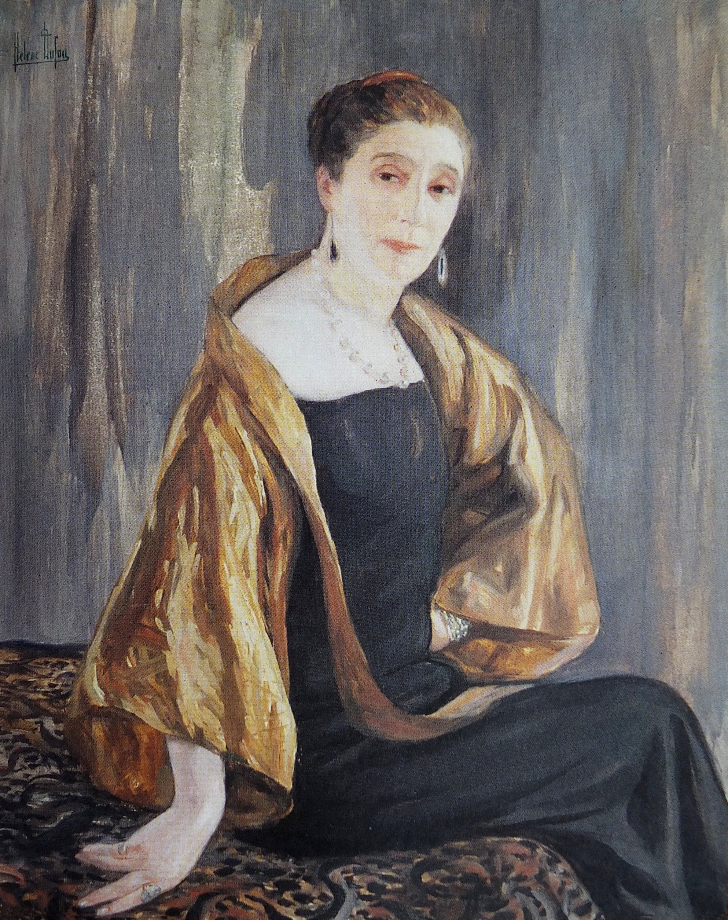 Portrait de Jeanne Lanvin, huile sur toile (1925) de Clémentine-Hélène Dufau (1869-1937). Conservé au musée des Arts Décoratifs, Paris. Reproduit dans De lumière et d'ombre: Clémentine-Hélène Dufau (Quinsac, 1869- Paris, 1937), de Mayi Milhou, éditions Art & Arts, 1997 - (ISBN : 2-911059-03-4) - Photo de cette reproduction par Siren-Com.